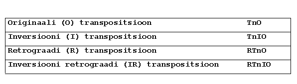 Võrdtempereeritud süsteemis helirea transpositsioonide tähistamine. T = transpositsiooni tähis, n = 1. transpositsiooniintervall, 2. originaali ja inversiooni esimese heli numbriline väärtus ning retrograadi ja inversiooni retrograadi viimase heli arvuline väärtus. Kuna rea originaal tähistatakse arvuga 0, vastab transpositsiooniintervalli arvuline väärtus heli arvulisele väärtusele